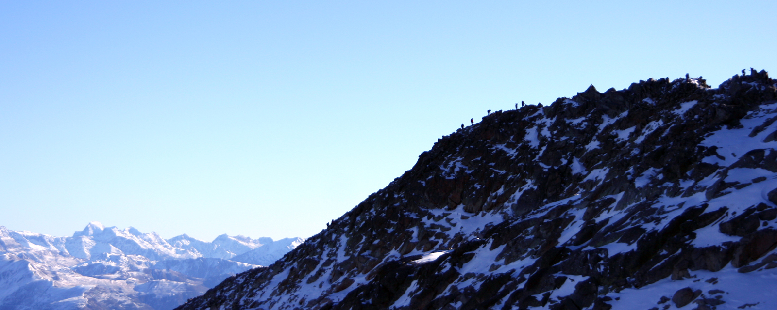 Portillón